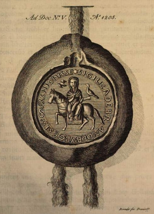 Falkenjagdsiegel der Ada von Holland, Markgräfin von Brandenburg, überliefert an Urkunden aus dem Jahr 1205, vgl. A. C. F. Koch (Hrsg.): Oorkondenboek van Holland en Zeeland tot 1299. Band 1. ’s-Gravenhage 1970, S. 453–455, Nr. 273–274 (Digitalisat). Umschrift: * SIGILL[UM] ADE BRANDEBVRGE[N]SIS MARCHIONISSE